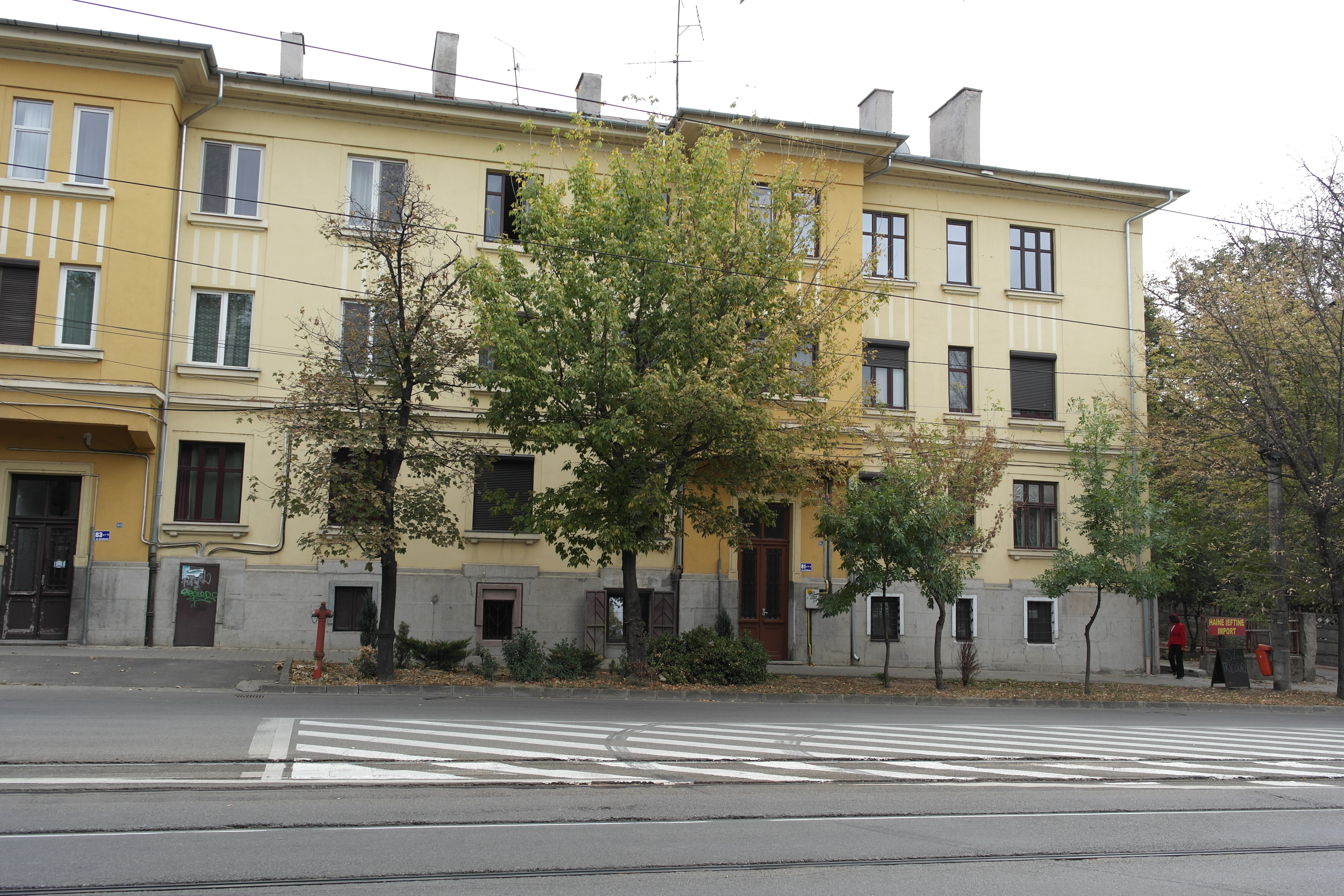 Reședință barocă